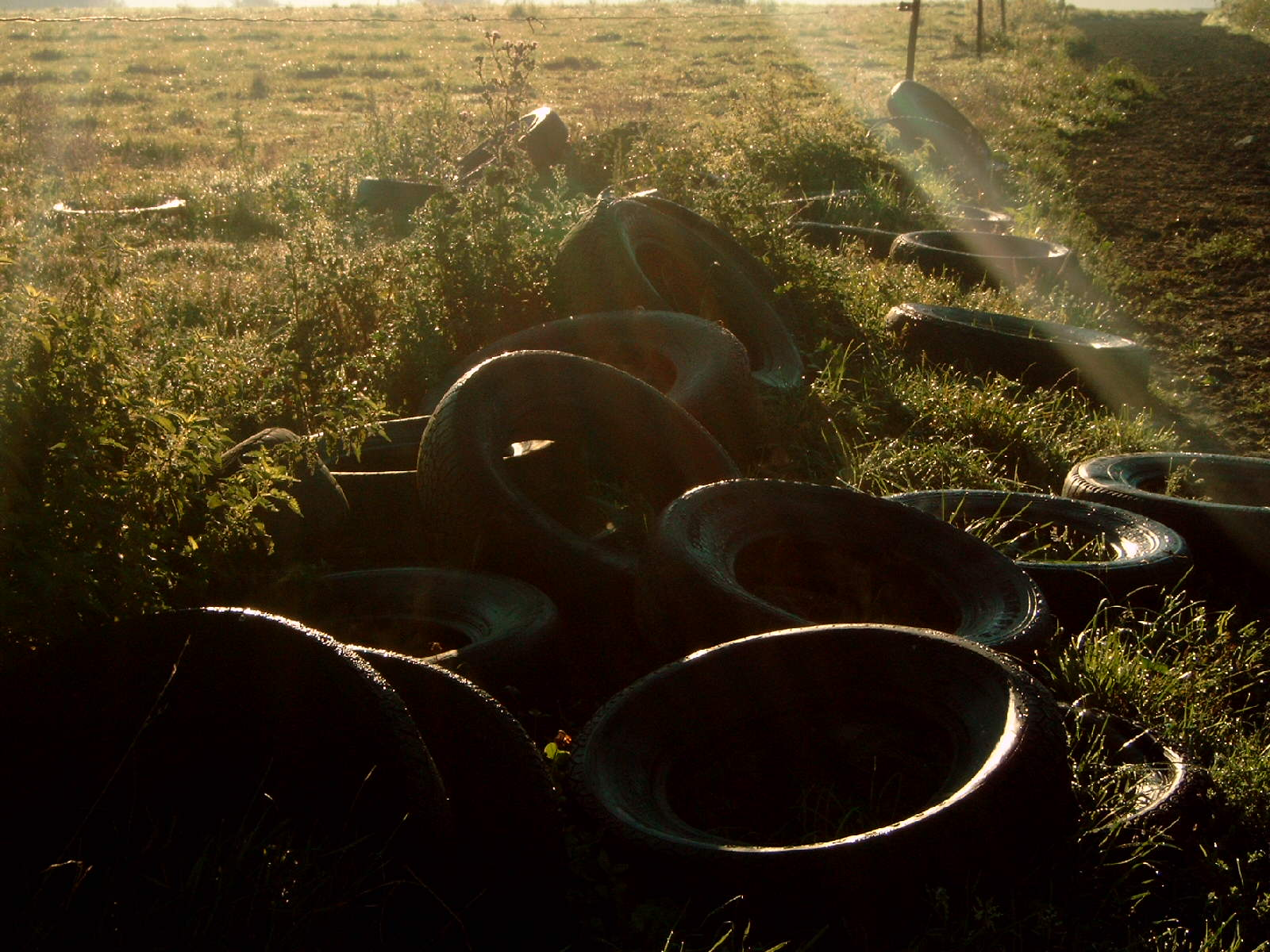 Afgedankte autobanden op een boerenerf. Eigen opname, beschikbaar voor publiek domein.